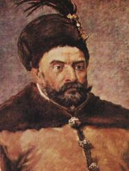 Štěpán Báthory, polský král a litevský velkovévoda, na obraze Jana Matejky.